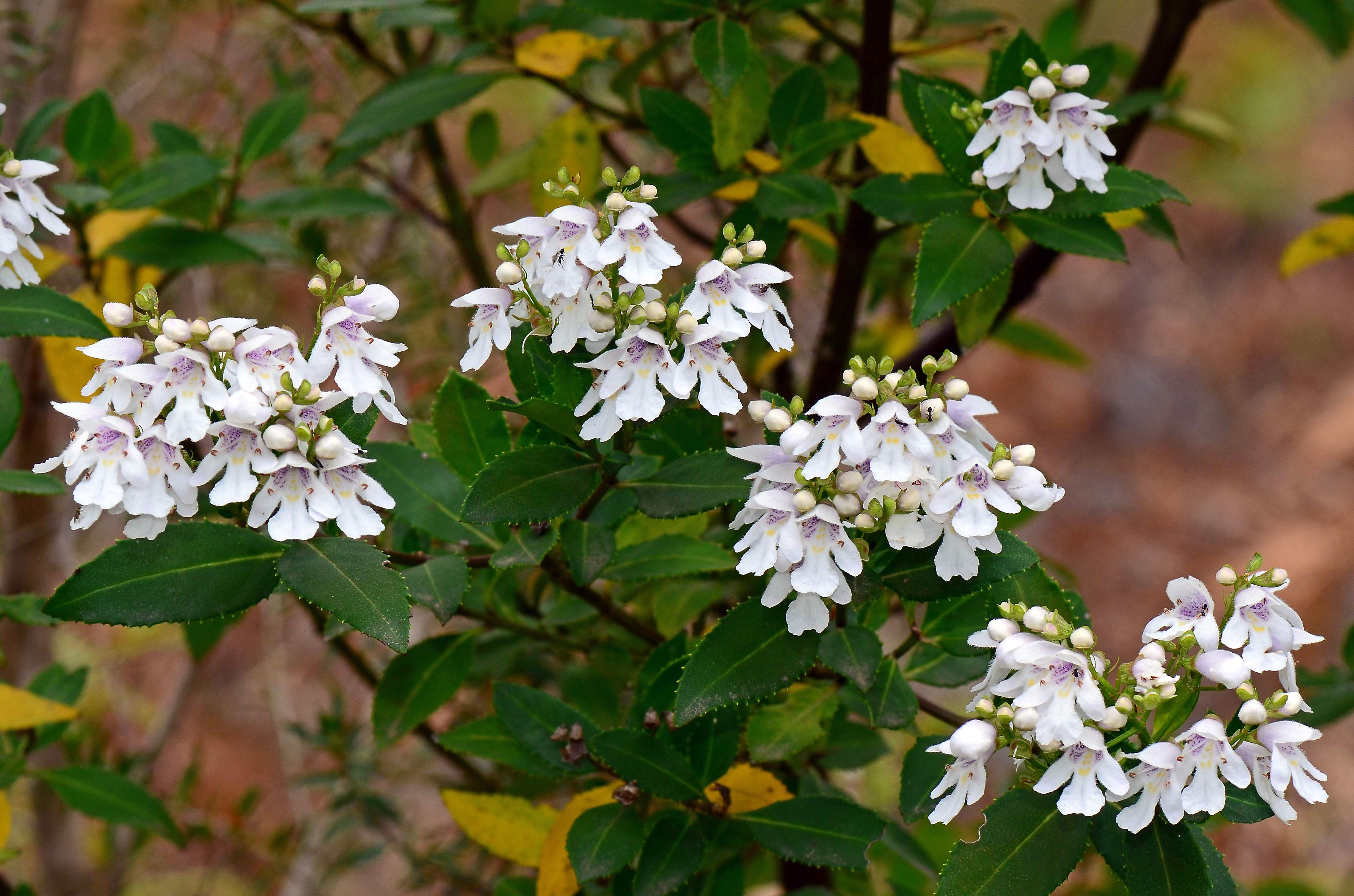 Prostanthera sp. Mt Kaputar (W.Schofield NE92414) como Prostanthera lasianthos var. subcoriacea (Grampians Christmas-bush) en Ararat, Victoria, Australia.